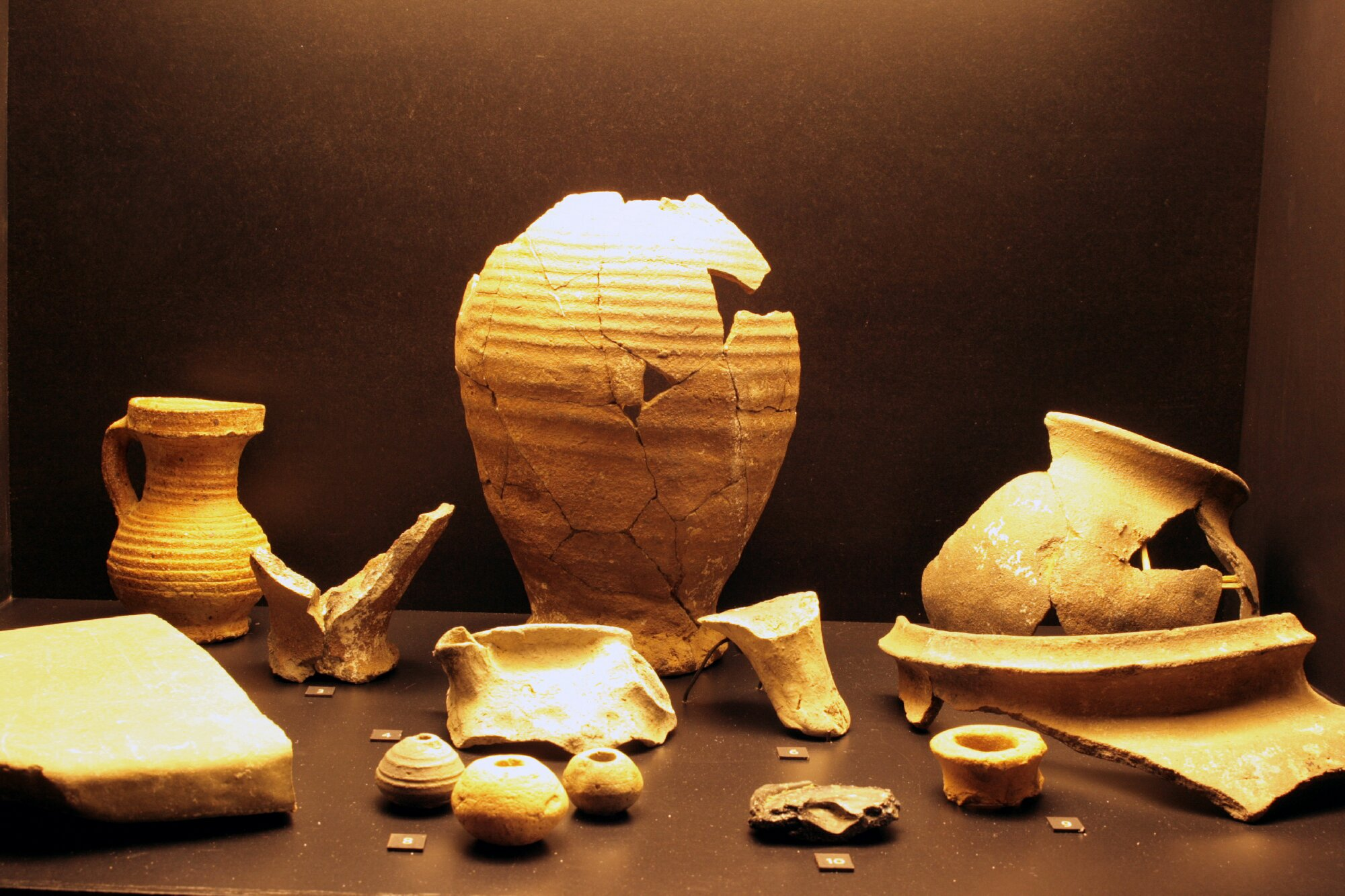 Keramik der Peperburg im Museum der Stadt Lennestadt